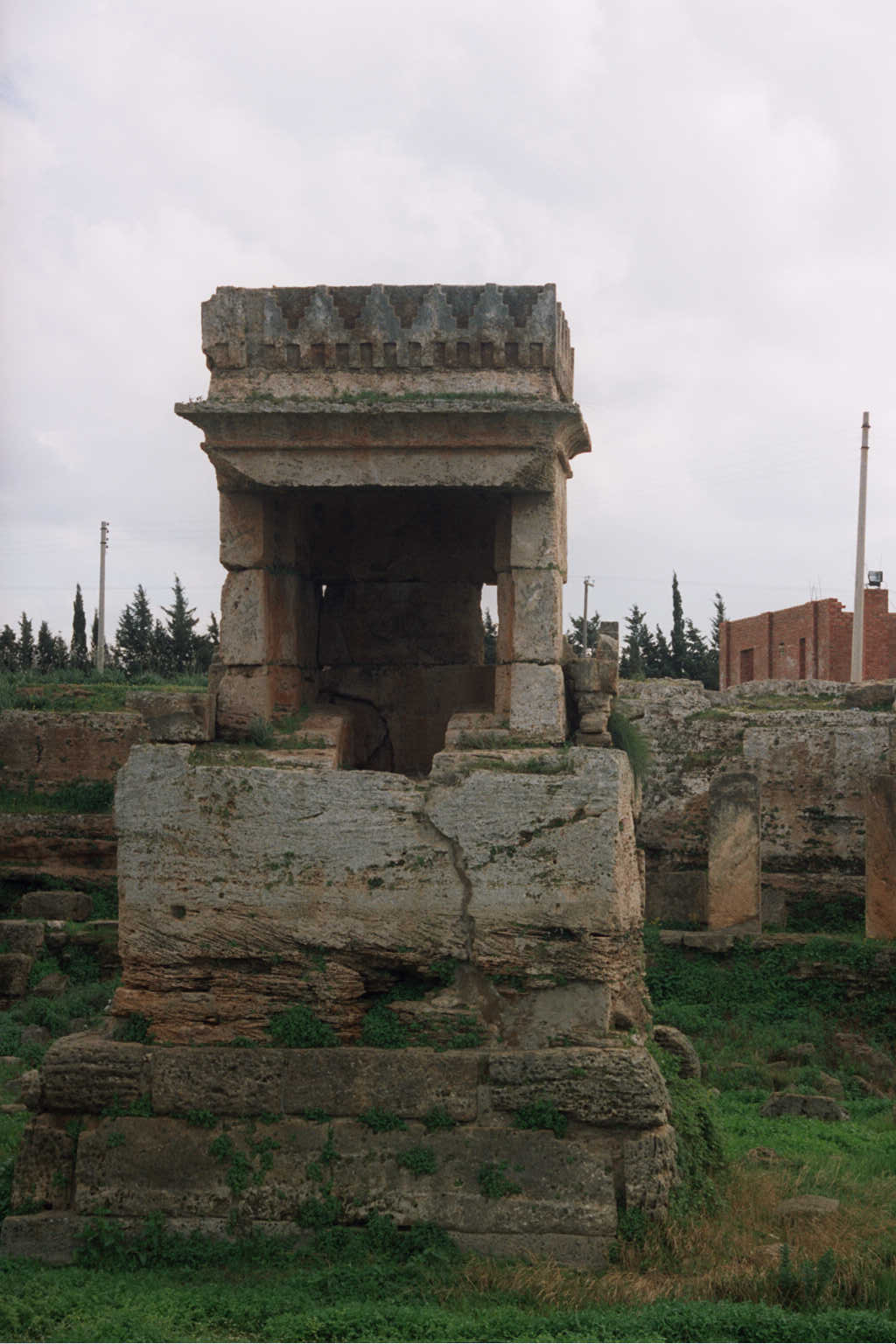 Amrit - Mabad